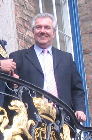 Fortuna steigt zum fünften Mal in die Bundesliga auf. Siegesfeier am darauffolgenden Nachmittag auf dem Rathausvorplatz. 16. Mai 2012. Vorstandsvorsitzender Peter Frymuth.